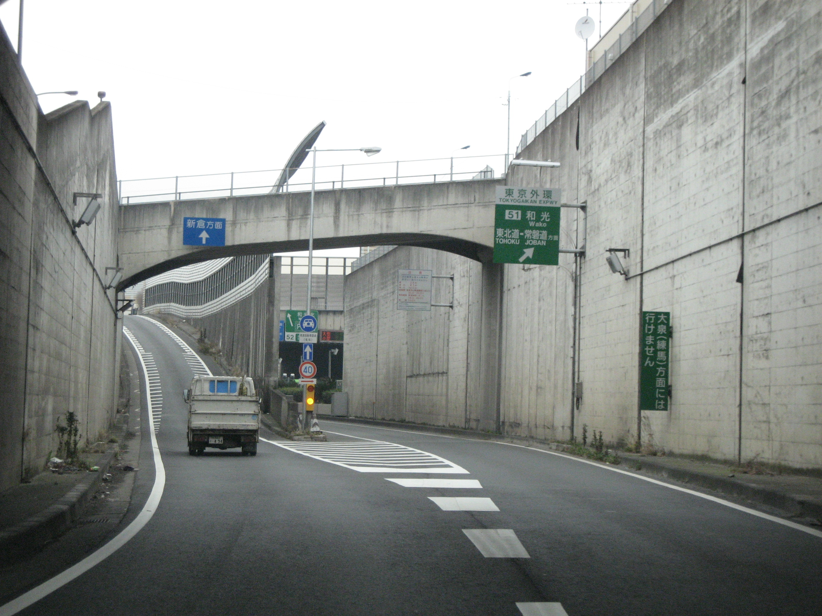 埼玉県道88号線和光IC入口付近